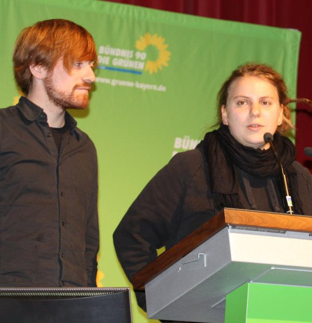 Karl Bär und Sina Doughan 2011 auf der Landesdeligiertenkonferenz von Bündnis90/Die Grünen Bayern.